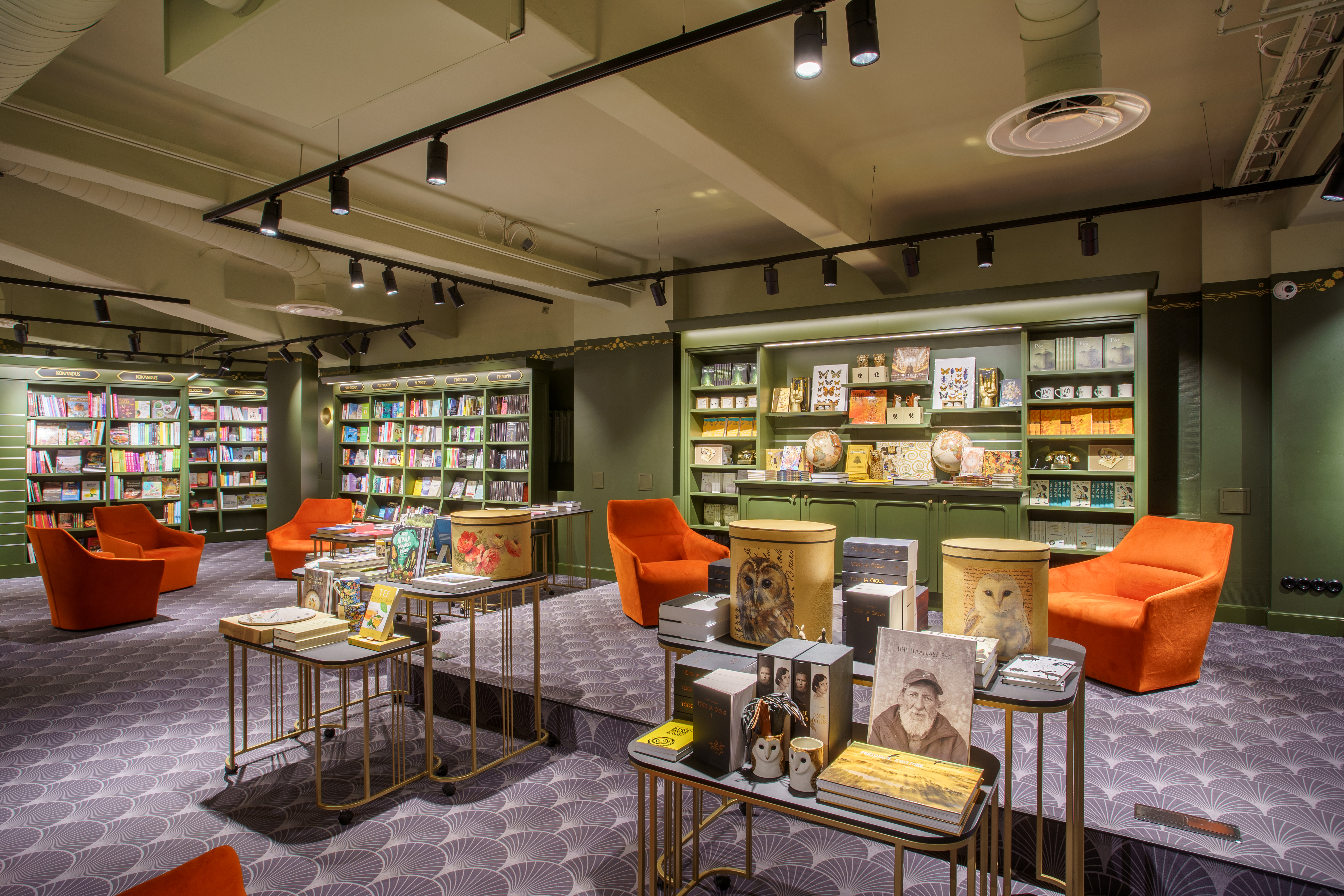 Vanalinnas asuv Rahva Raamatu kauplus, mis on ühtlasi Eesti vanim raamatupood, valiti kolme parima raamatupoe sekka maailmas.